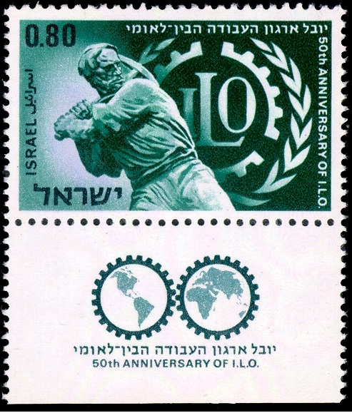 בול יובל ארגון העבודה הבינלאומי